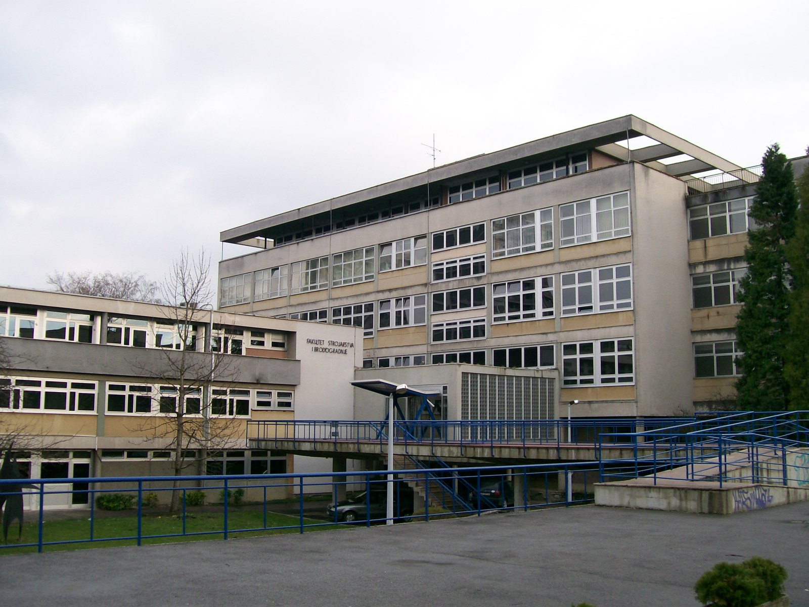 Fakultet strojarstva i brodogradnje u Zagrebu (sjeverna zgrada)